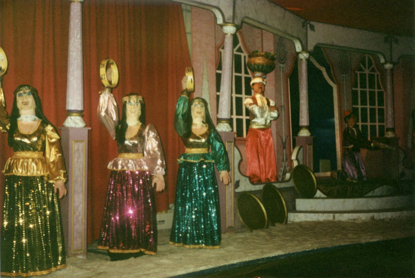 WalibiPalaisAlibaba